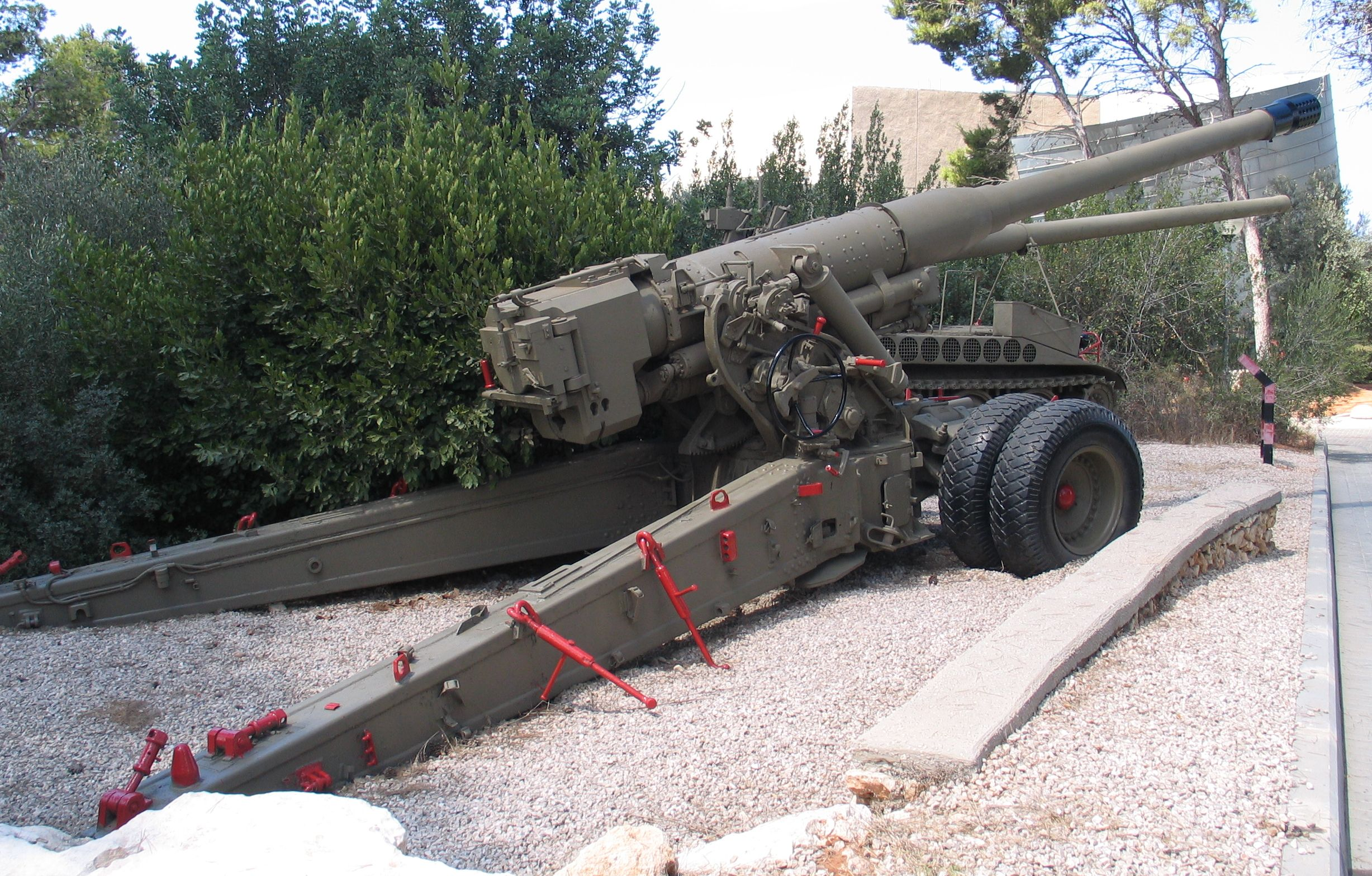 Soviet S-23 180 mm gun in Beyt ha-Totchan, Zichron Yaakov, Israel.